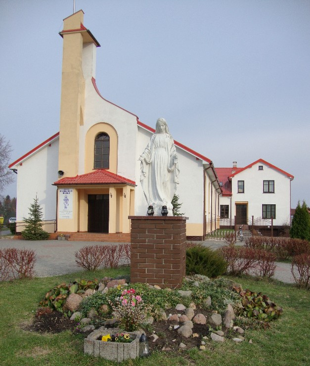 Kościół Miłosierdzia Bożego w Gostyninie